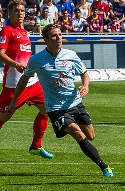 Nicolai Müller am 2. Spieltag der Saison 2013/14 (17. August 2013). Im Hintergrund: Oliver Sorg